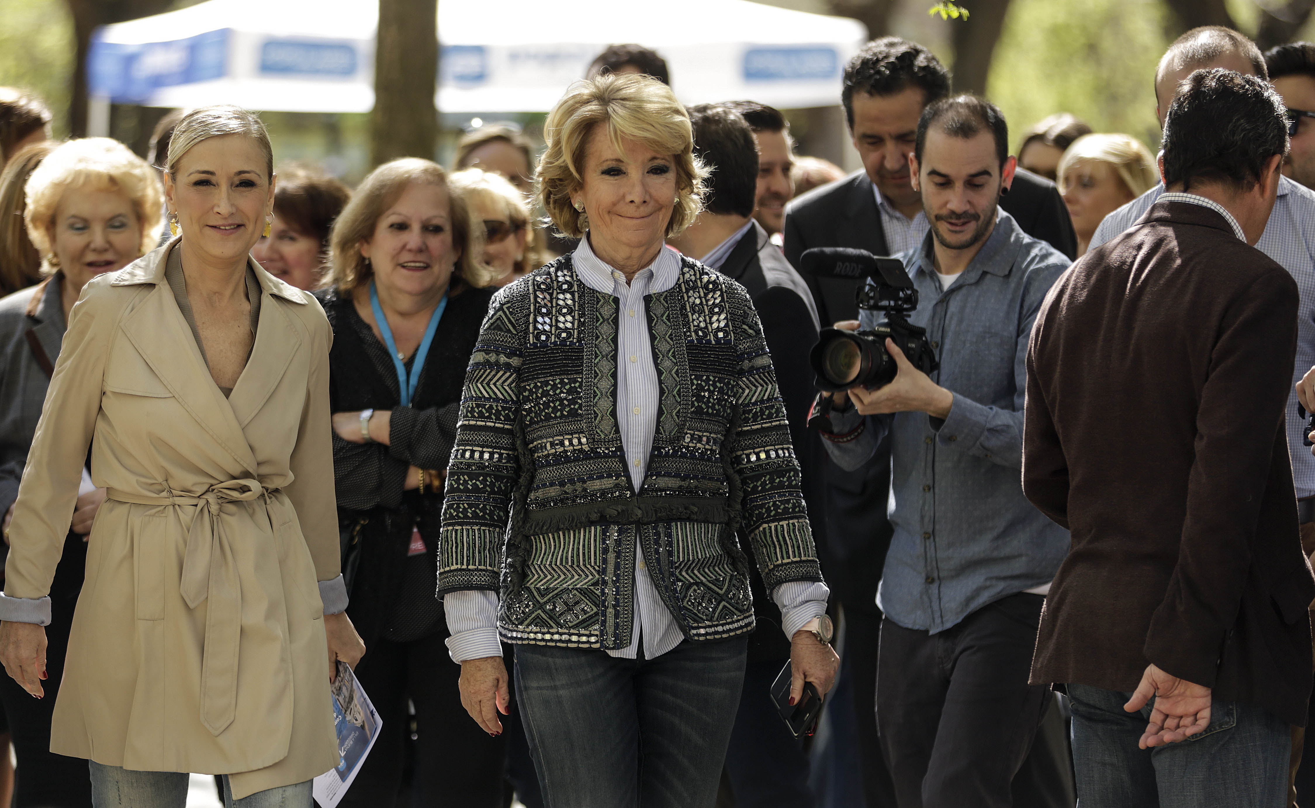 Presentación Candidatos Zona Sur